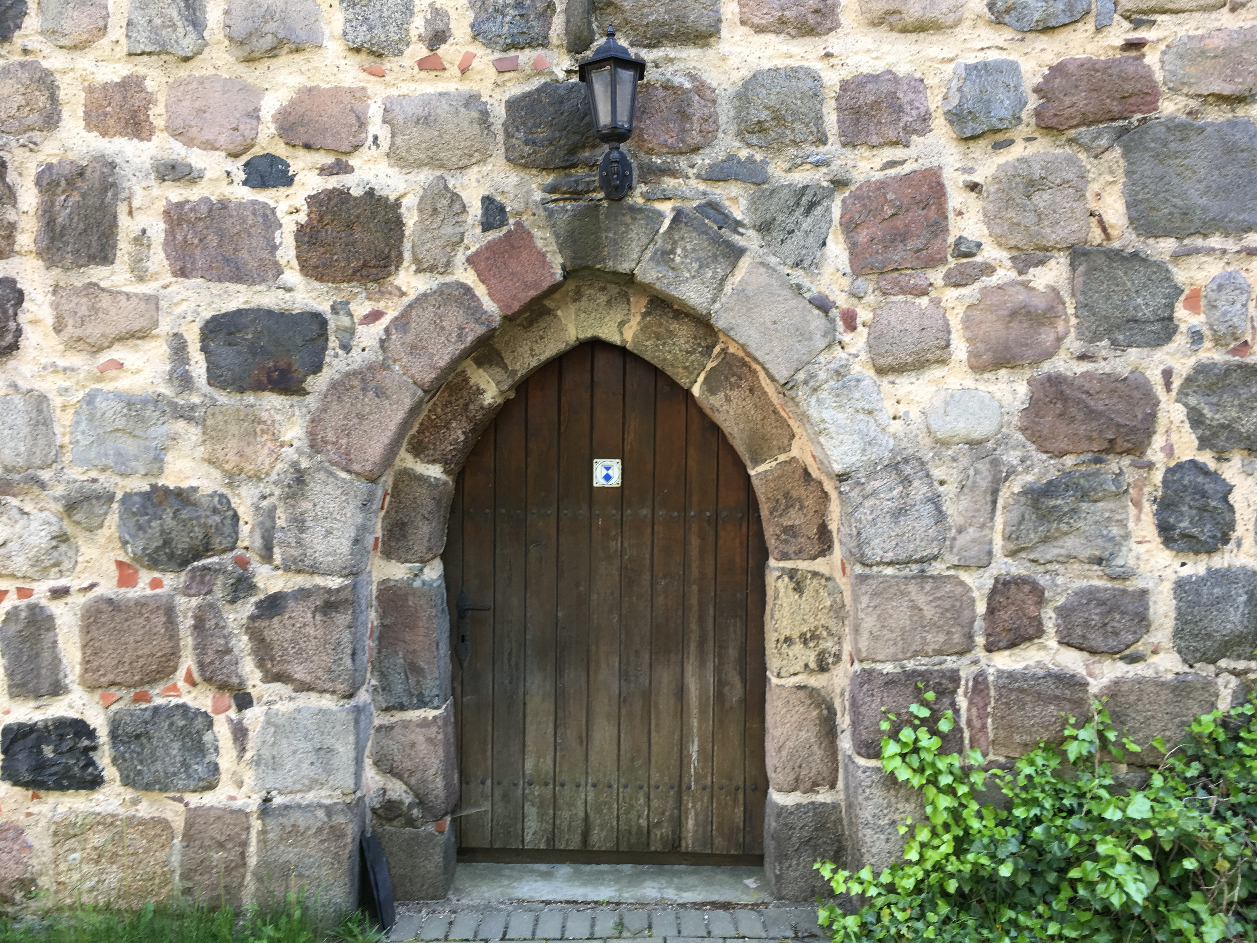 Die Dorfkirche in Selchow ist eine romanische Feldsteinkirche aus der ersten Hälfte des 13. Jahrhunderts. Die Fenster wurden um 1700 zum Teil vergrößert; das Bauwerk in den Jahren 1972 und 1973 restauriert. Im Innern befinden sich unter anderem ein zweigeschossiger Kanzelaltar und eine Fünte aus dem Jahr 1710 sowie ein Kruzifix, dass Ende des 15. Jahrhunderts geschaffen wurde.